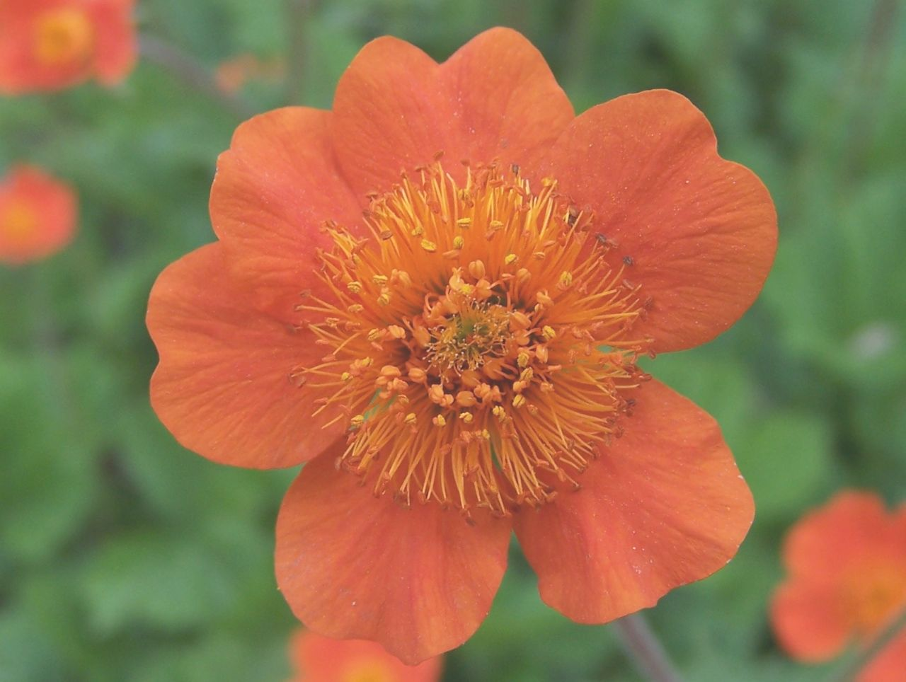 Geum coccineum (pl. kuklik szkarłatny)